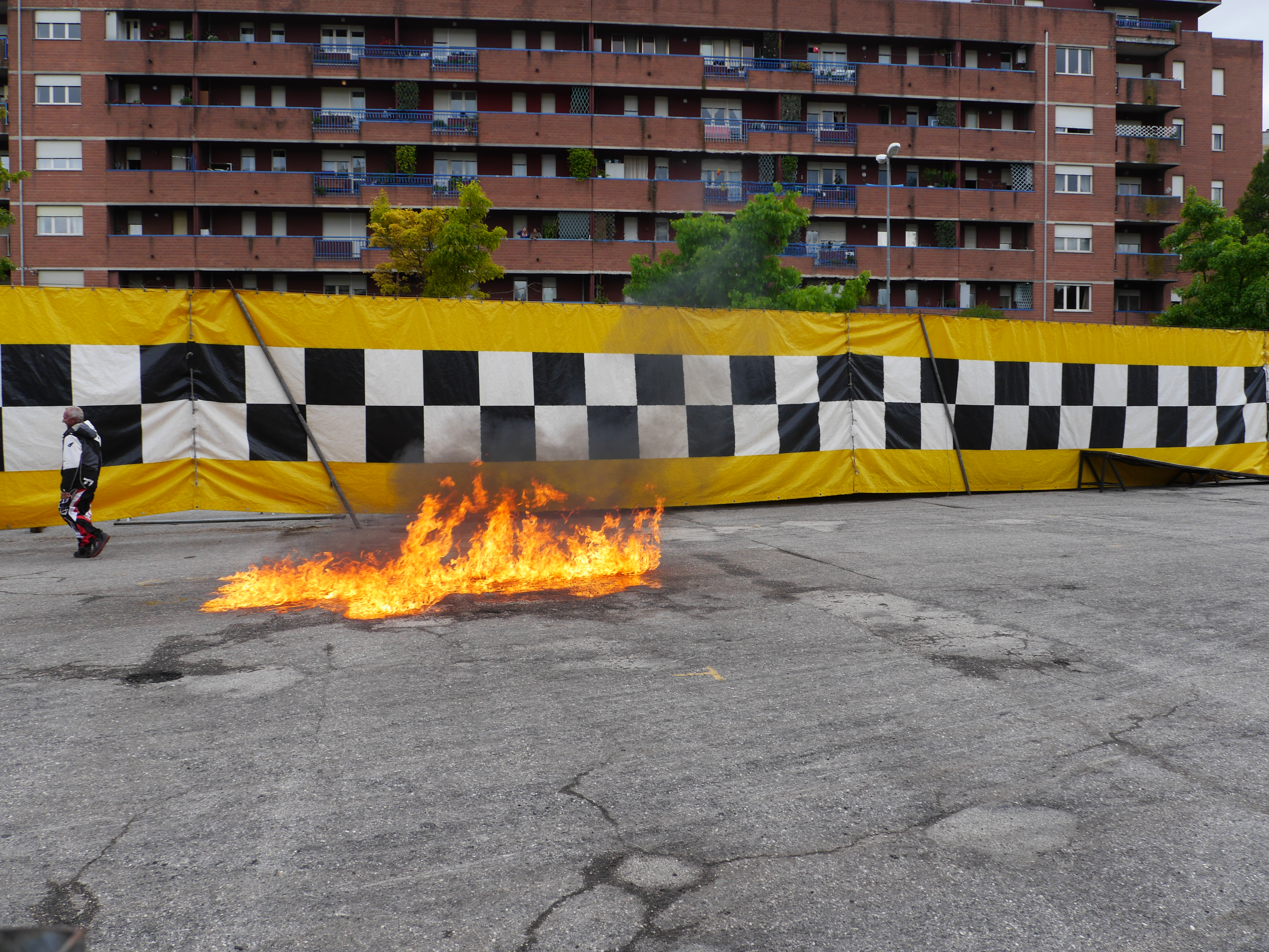 This photo was taken with Panasonic Lumix DMC-GH3 camera, thanks to Panasonic. You can see all photographs in category: Taken with Panasonic Lumix DMC-GH3.